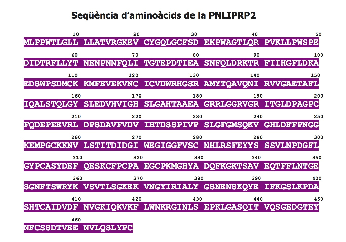 PNLIPRP2